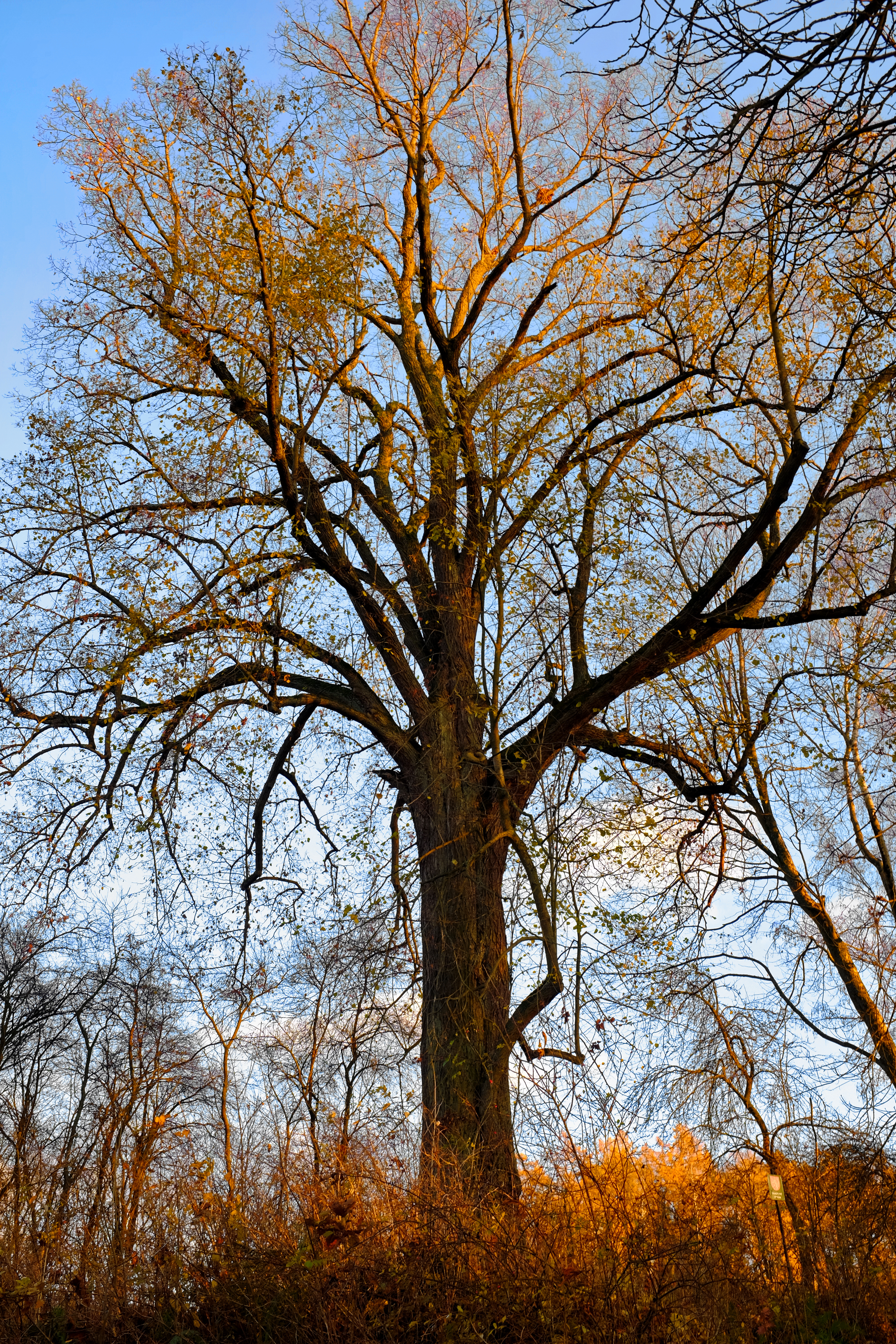 Památný strom Lípa v Arnoltově, část města Březová, okres Sokolov